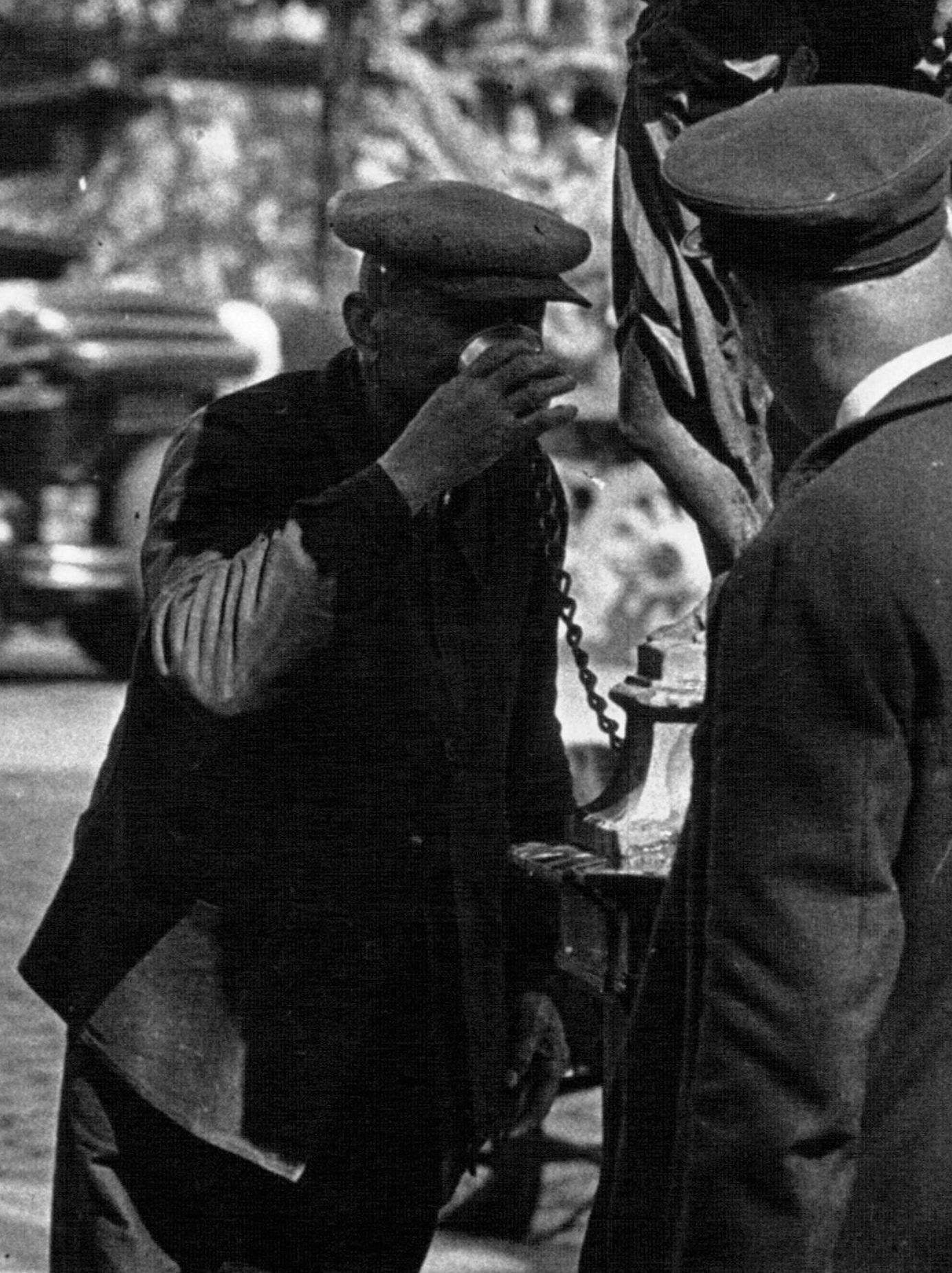 Vague de chaleur, personne se rafraîchissant : [photographie de presse] / Agence Mondial (détail)